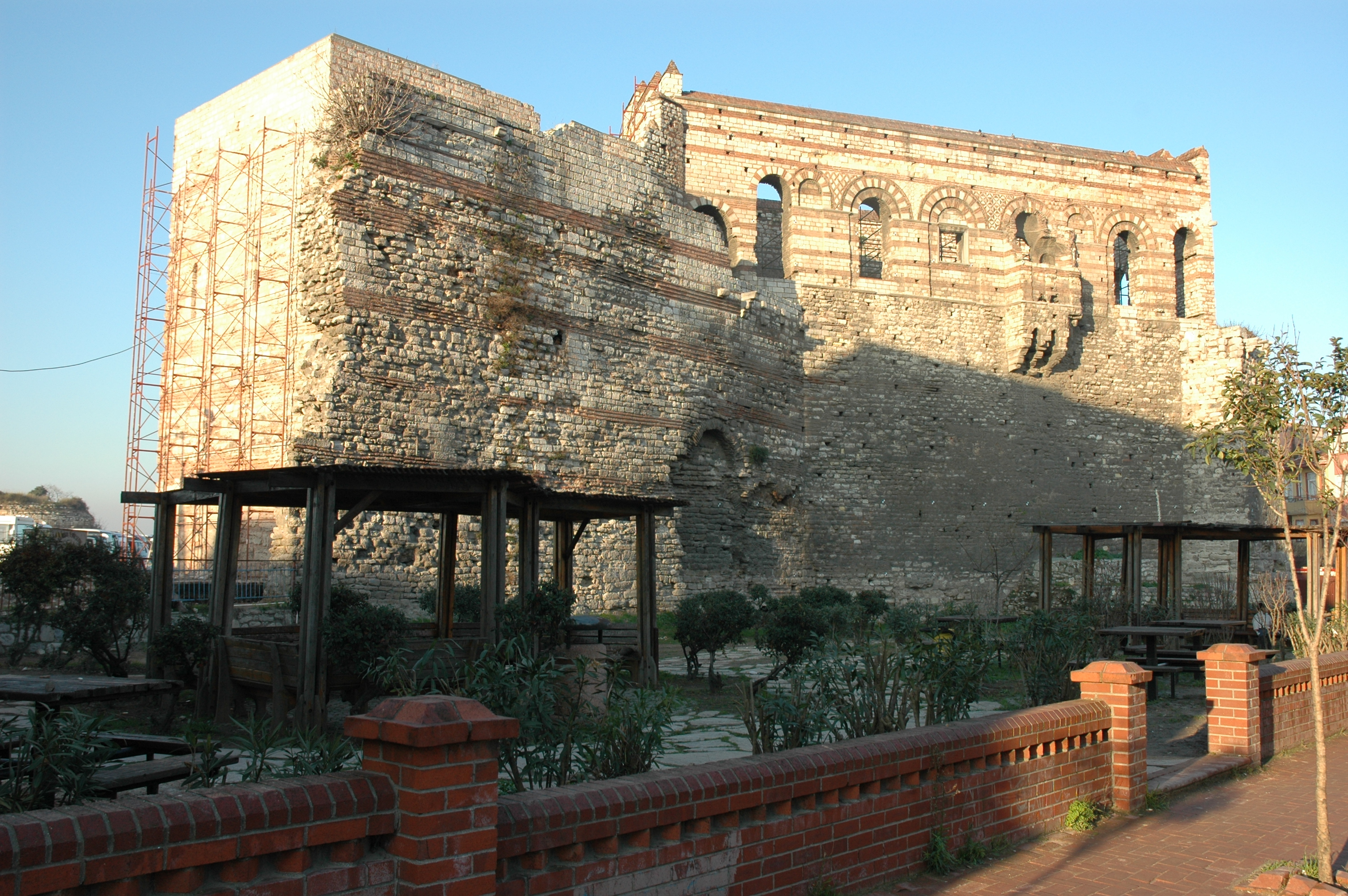 Istanbul - Palau dels Porfirogenetes